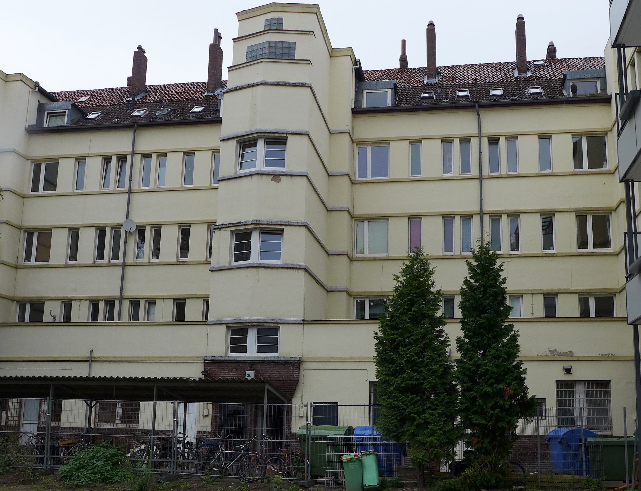 Niedersachsen, Hannover, Linden Nord